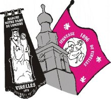 Logo Marche Notre-Dame de lumière